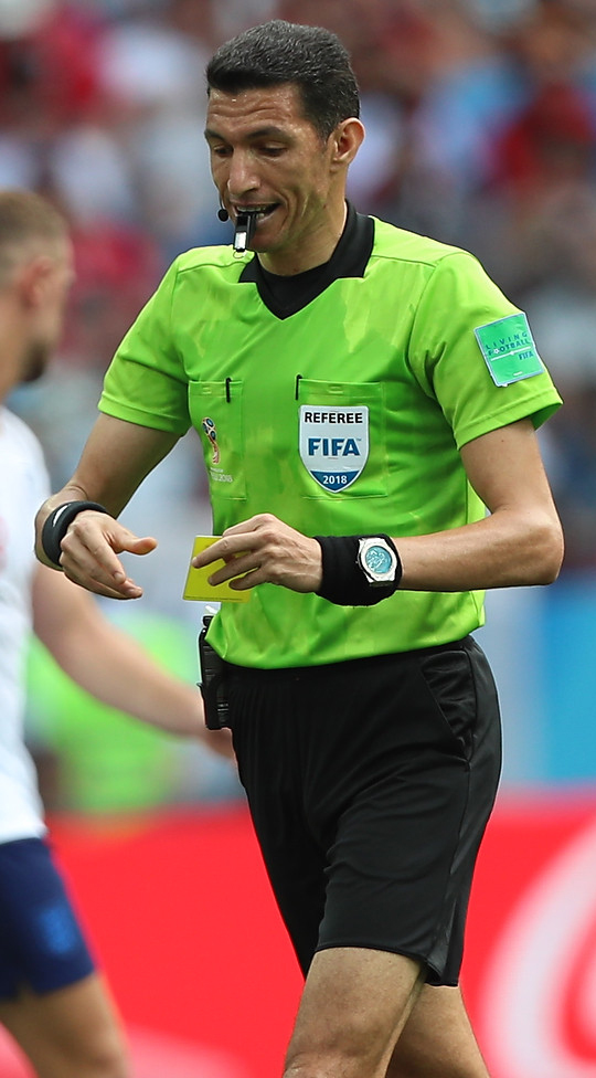 Сборная Англии сокрушила Панаму, Кейн оформил хет-трик